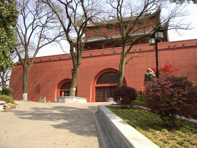 鼓楼 2004年4月14日撮影 撮影者：権作 参照：